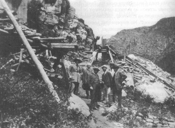 Язовир Въча в строеж